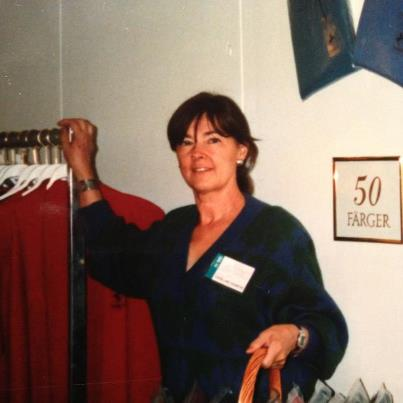 Eira Ullberg, Textilkonstnär, utställning av stickade tröjor i egen design, -90-tal.